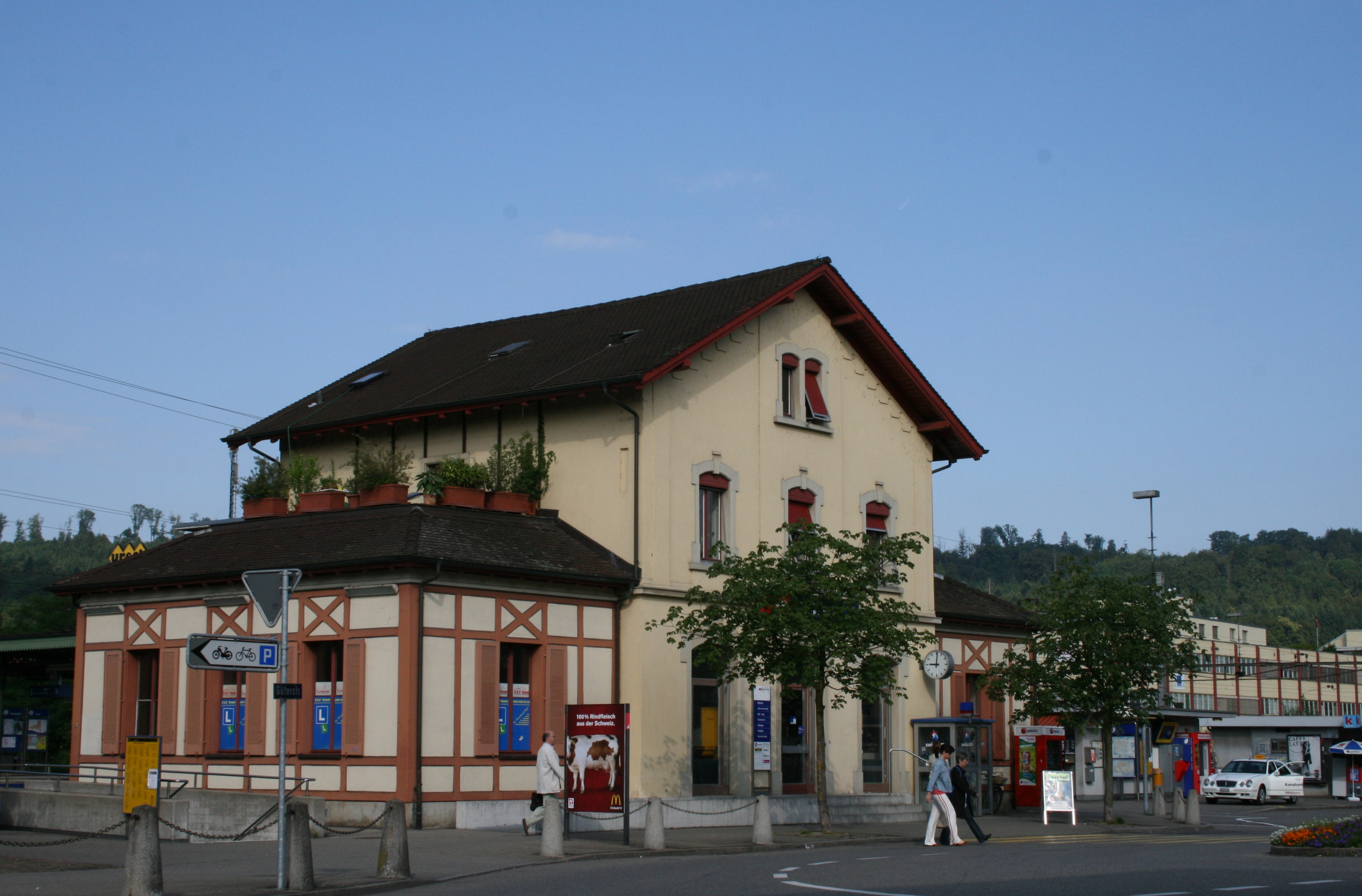 Bahnhof Wettingen, Schweiz